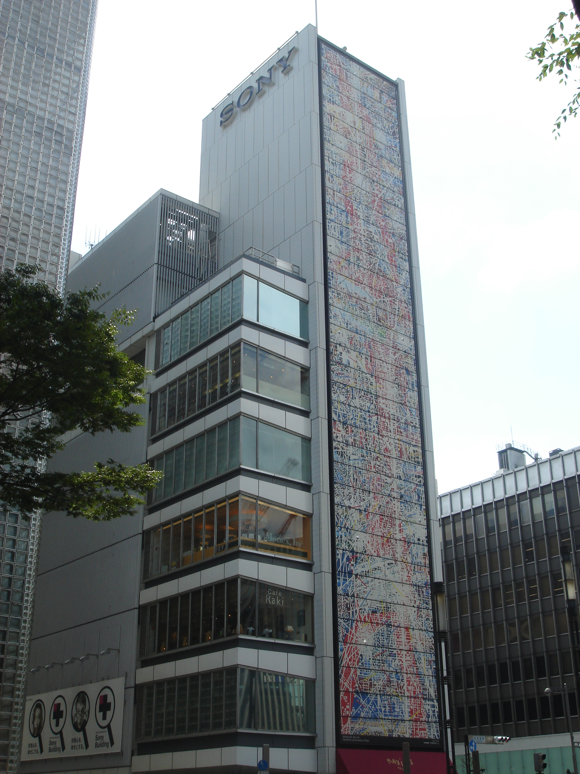 Sony Building, Ginza, Tokyo, Japan